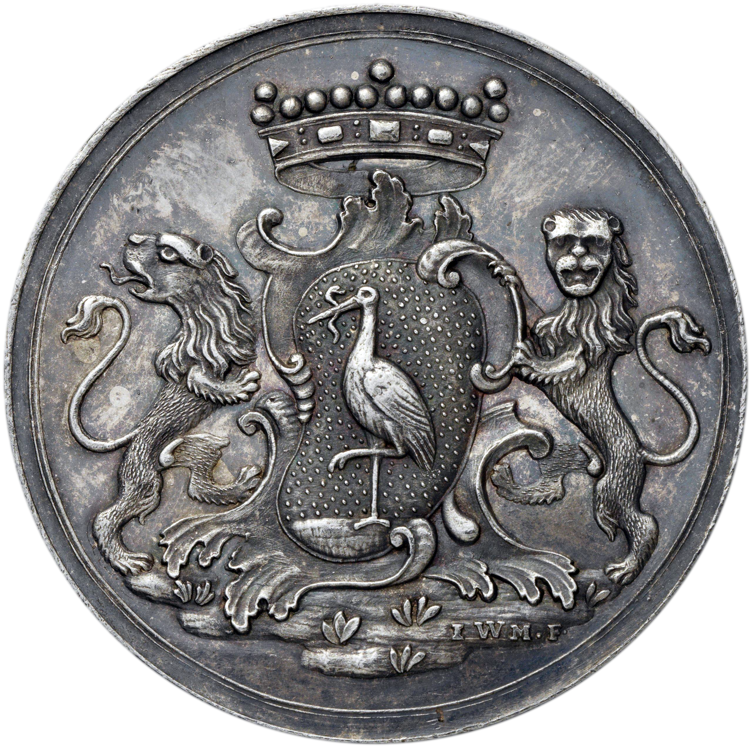 Vroedschapspenning van de stad 's-Gravenhage. Zilveren penning. Voorzijde: gekroond wapenschild in cartouche, geflankeerd door twee leeuwen. Keerzijde: vrouw met gepluimde helm, geschubd harnas en scheepsroer in linkerhand, houdt hand vast van naast haar staande Gerechtigheid met weegschaal in enigszins geheven linkerhand binnen omschrift; afsnede: monogram van letters S en C Afmetingen: d 3,7 cm × g 17,35 gr Materiaal: zilver